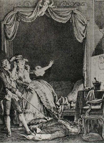 Sainte Vierge! s'ecria-t-elle qu'allons nous devenir? Un Homme tue chez moi!, illustration from chapter 9 of 'Candide' by Voltaire